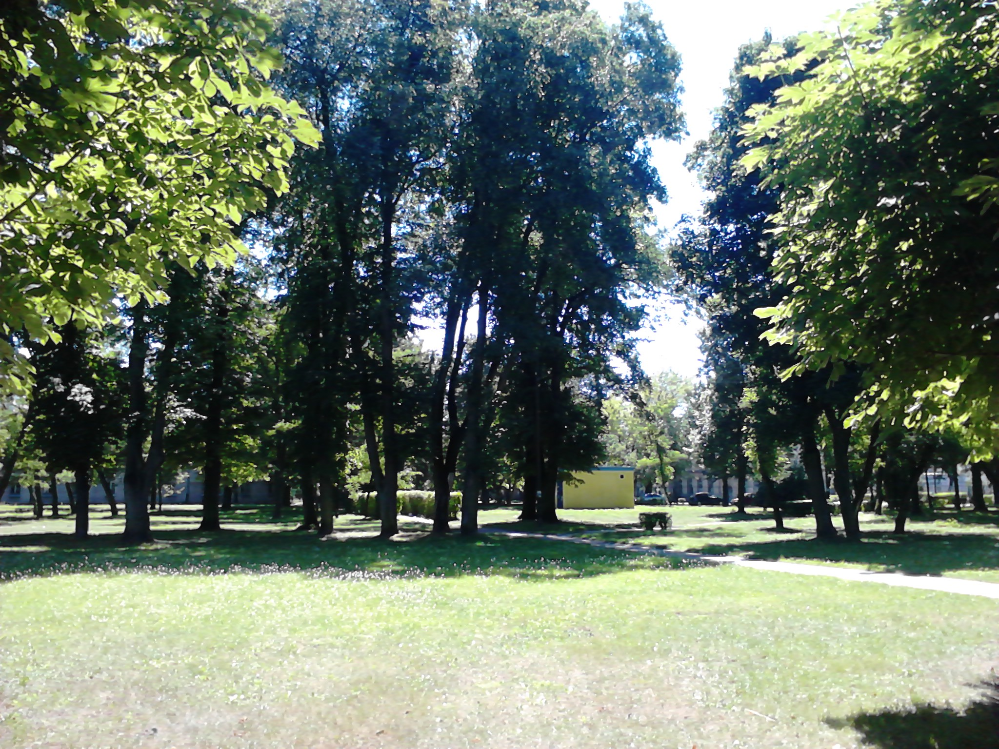 Miejsce po wojskowej cerkwi (wzniesionej w XIX w. i rozebranej po 1918) w kompleksie koszar w Przasnyszu